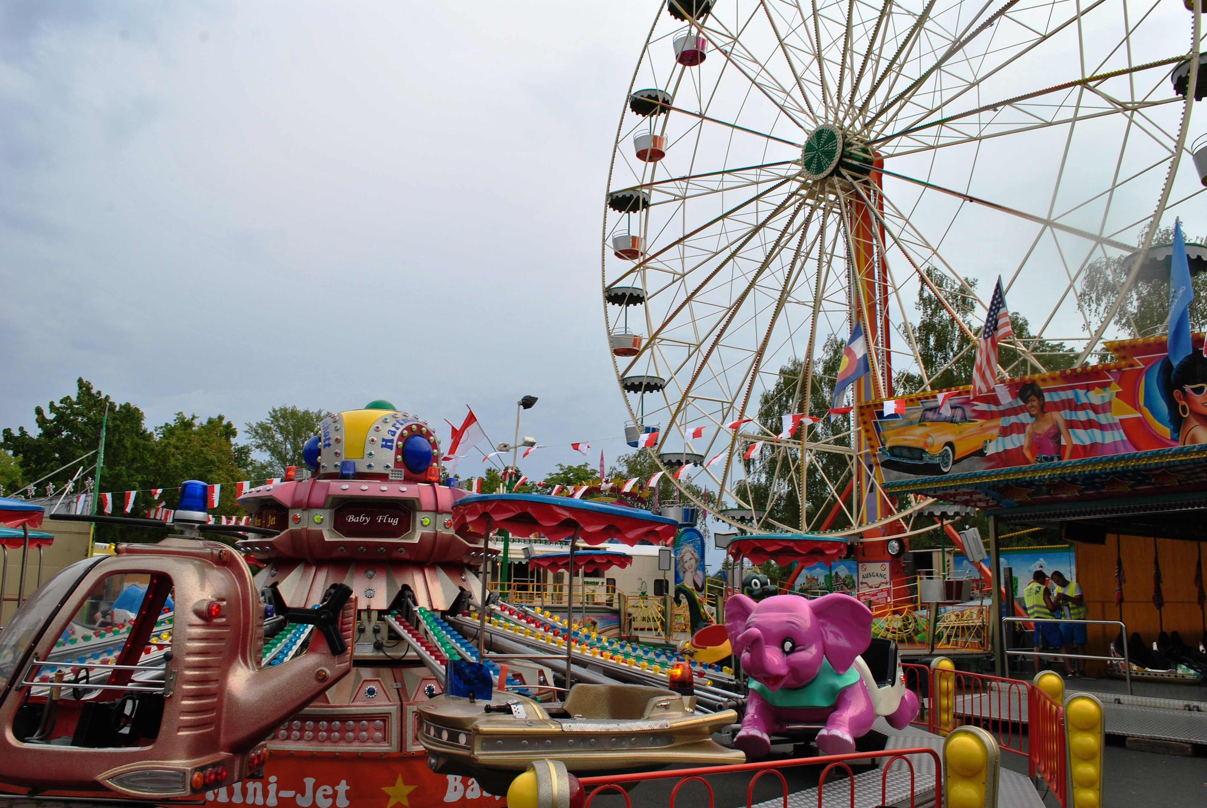 Fränkisches Weinfest Volkach, Rummelplatz, Riesenrad und Karussel